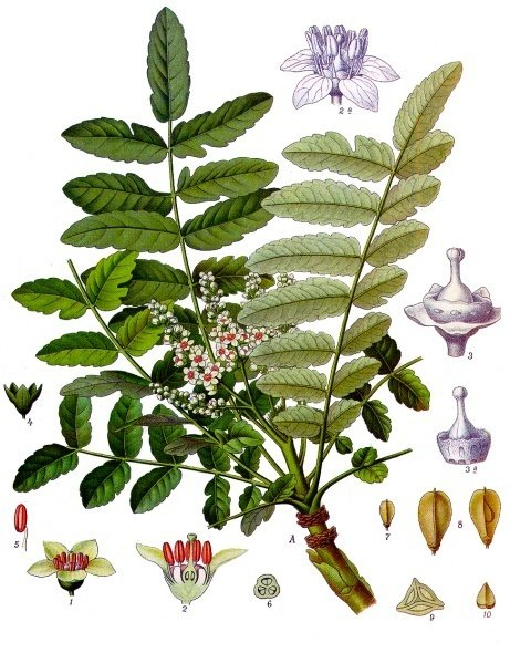 Weihrauchbaum. A Blüthenzweig, natürl. Grösse (unter Zugrundelegung der Bentley'schen Zeichnung). 1 Blüthe, vergrössert; 2 dieselbe im Längsschnitt, desgl.; 2a Blüthe, desgl. (nach Bâillon); 3 Kelch mit Diskus und Stempel (nach Bâillon), mit den Narben der entfernten Kronblätter und Staubgefässe, desgl.; 3a Diskus und Stempel der als Mohr madow bekannten Form (nach Bâillon), desgl.; 4 Kelch, desgl.; 5 Staubgefäss, desgl.; 6 Fruchtknoten im Querschnitt, desgl.; 7, 8 Frucht, natürl. Grösse und vergrössert; 9 Steinfrucht im Querschnitt, 10 Steinkern, desgl.